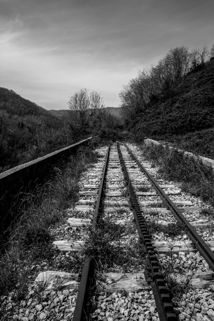 Cremagliera dell'ex ferrovia Paola-Cosenza This is a photo of a monument which is part of cultural heritage of Italy.